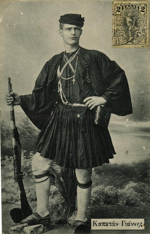 Гъркоманският капитан Янис Рамналис.